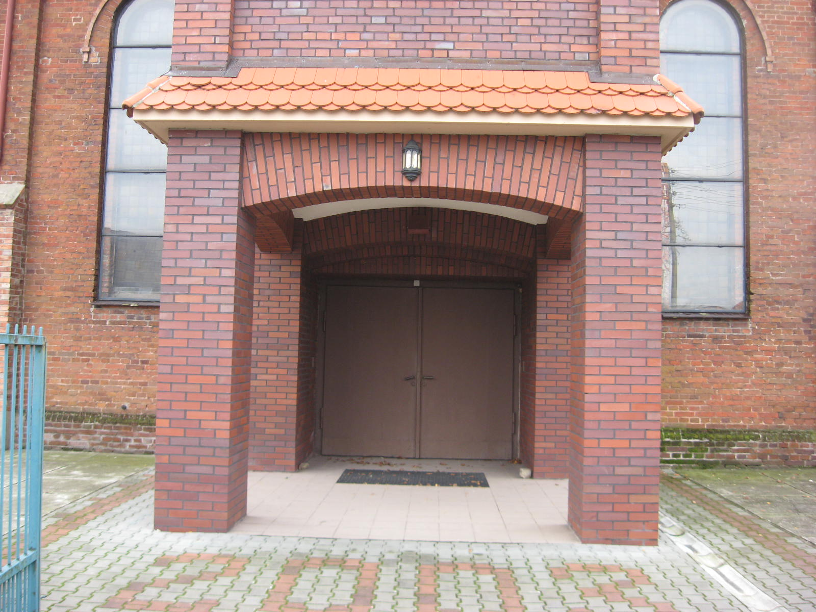 Wejście główne 02